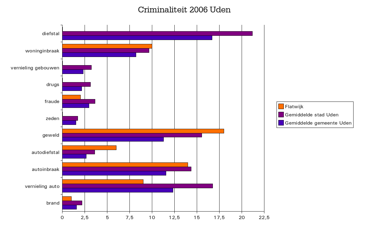 Criminaliteitcijfers in Uden Flatwijk (2006), Noord-Brabant, The Netherlands